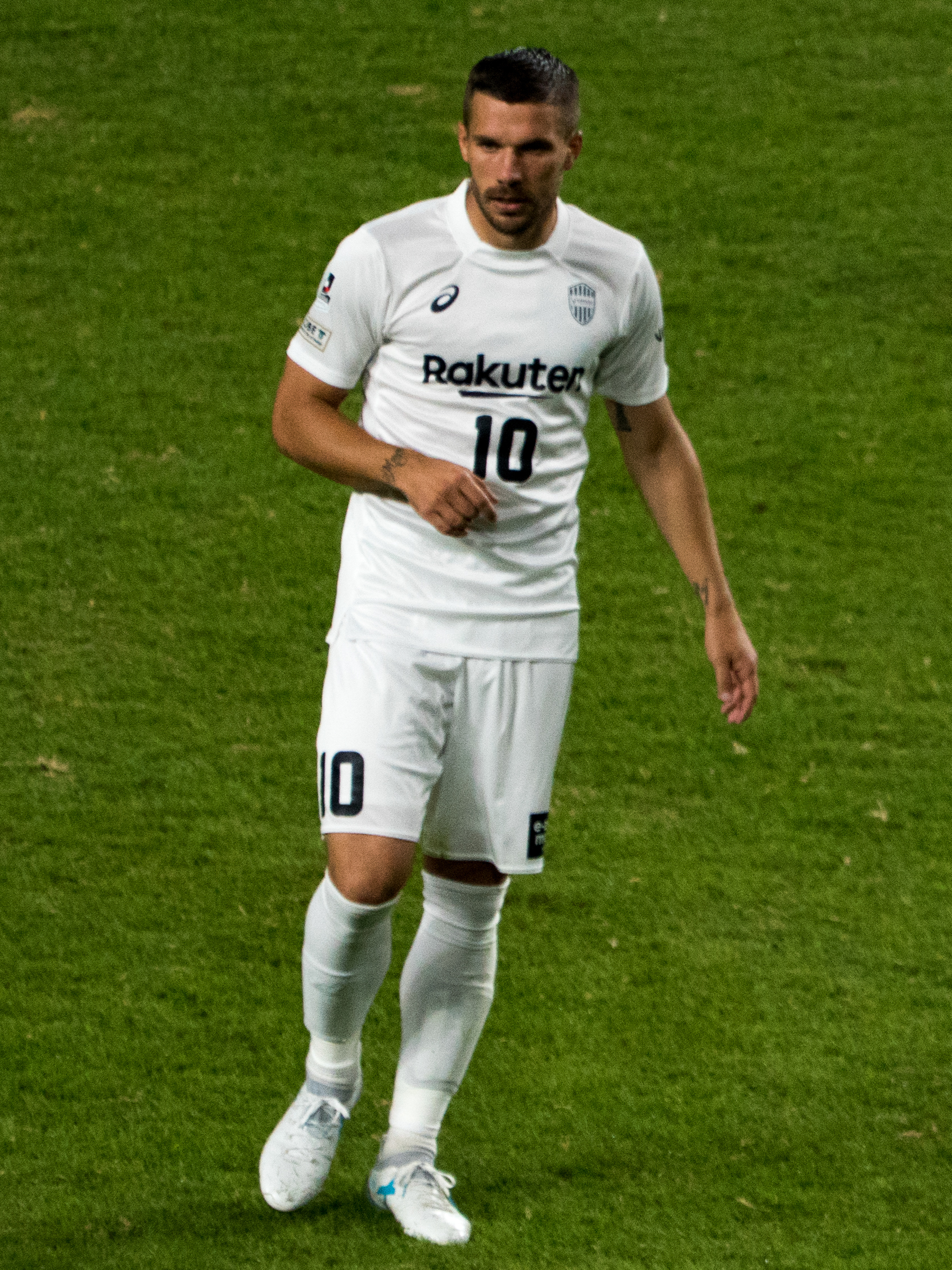 明治安田生命J1リーグ【2017シーズン17第25節】G大阪vs神戸-44.jpg